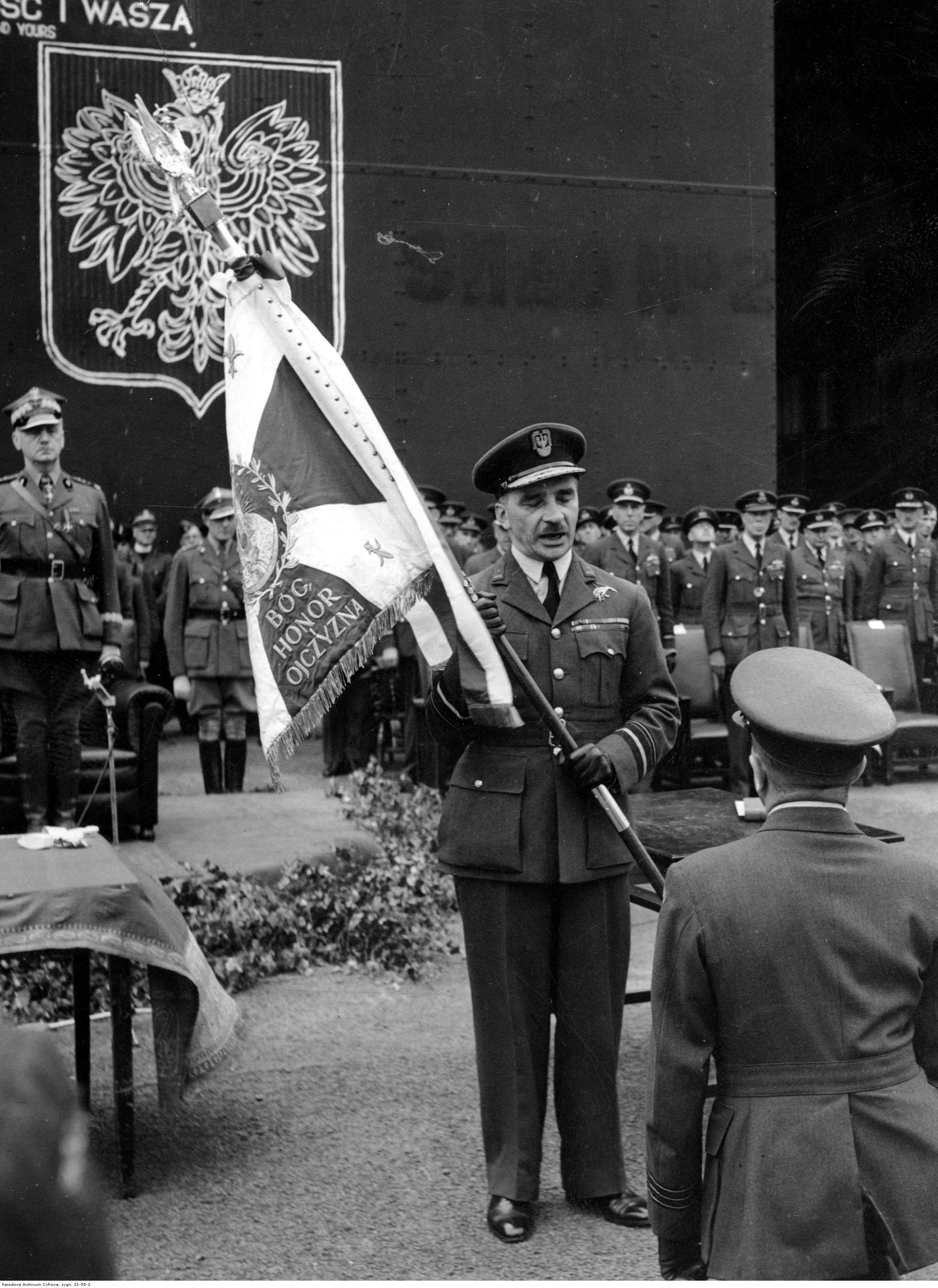 Fragment uroczystości. Inspektor generalny Polskich Sił Powietrznych gen. Stanisław Ujejski przekazuje sztandar dowódcy 300 dywizjonu bombowego. Widoczny także m.in. premier RP i Naczelny Wódz gen. Władysław Sikorski (z lewej).